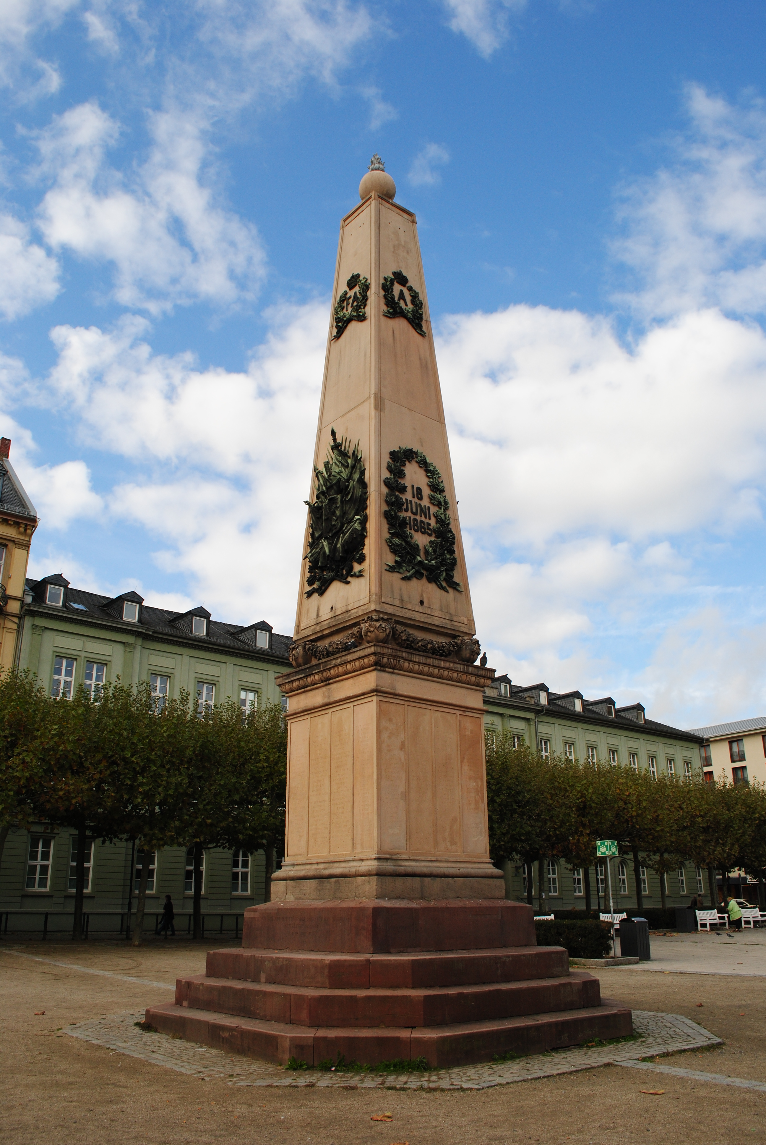 Waterloo-Obelisk, Wiesbaden